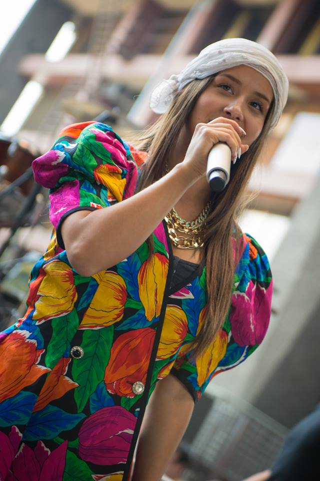 Apresentação no Reforestón 2013